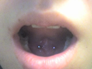 Tongue frenulum piercing